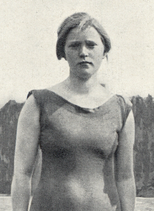 Ella Eklund